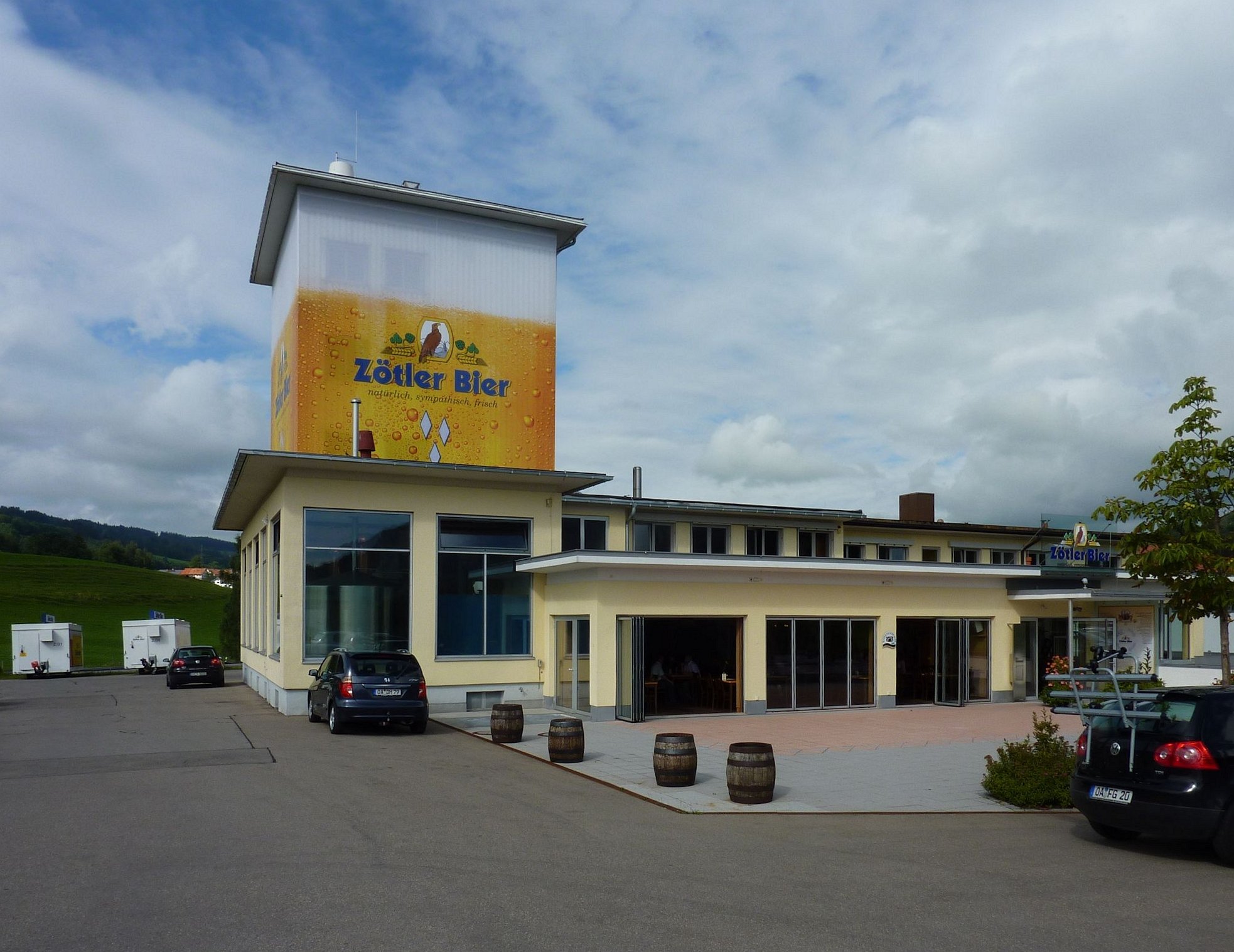 Besucherzentrum der Brauerei Zötler in Rettenberg